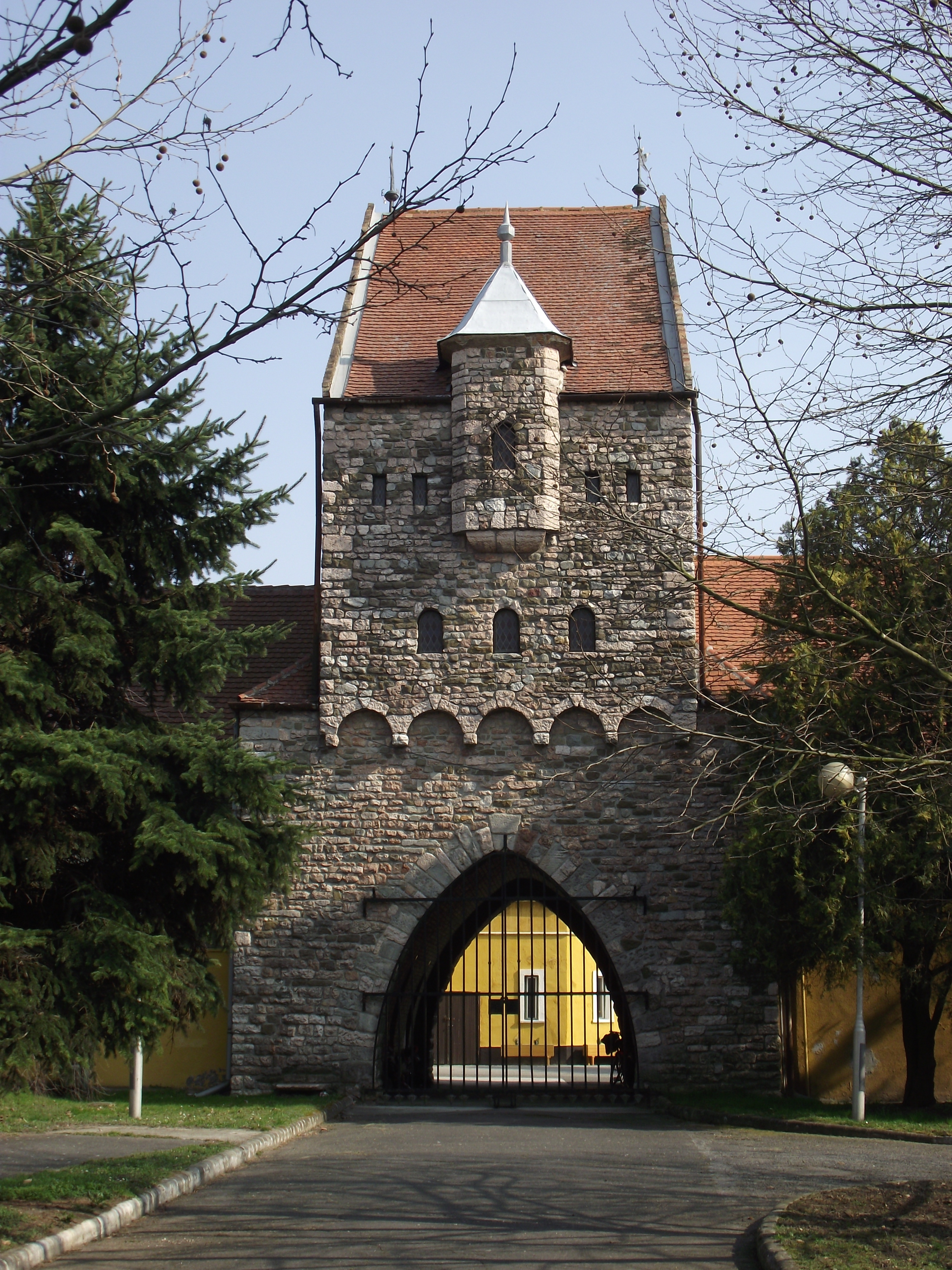 Bábolna - A ménesbirtok Hősi-kapuja